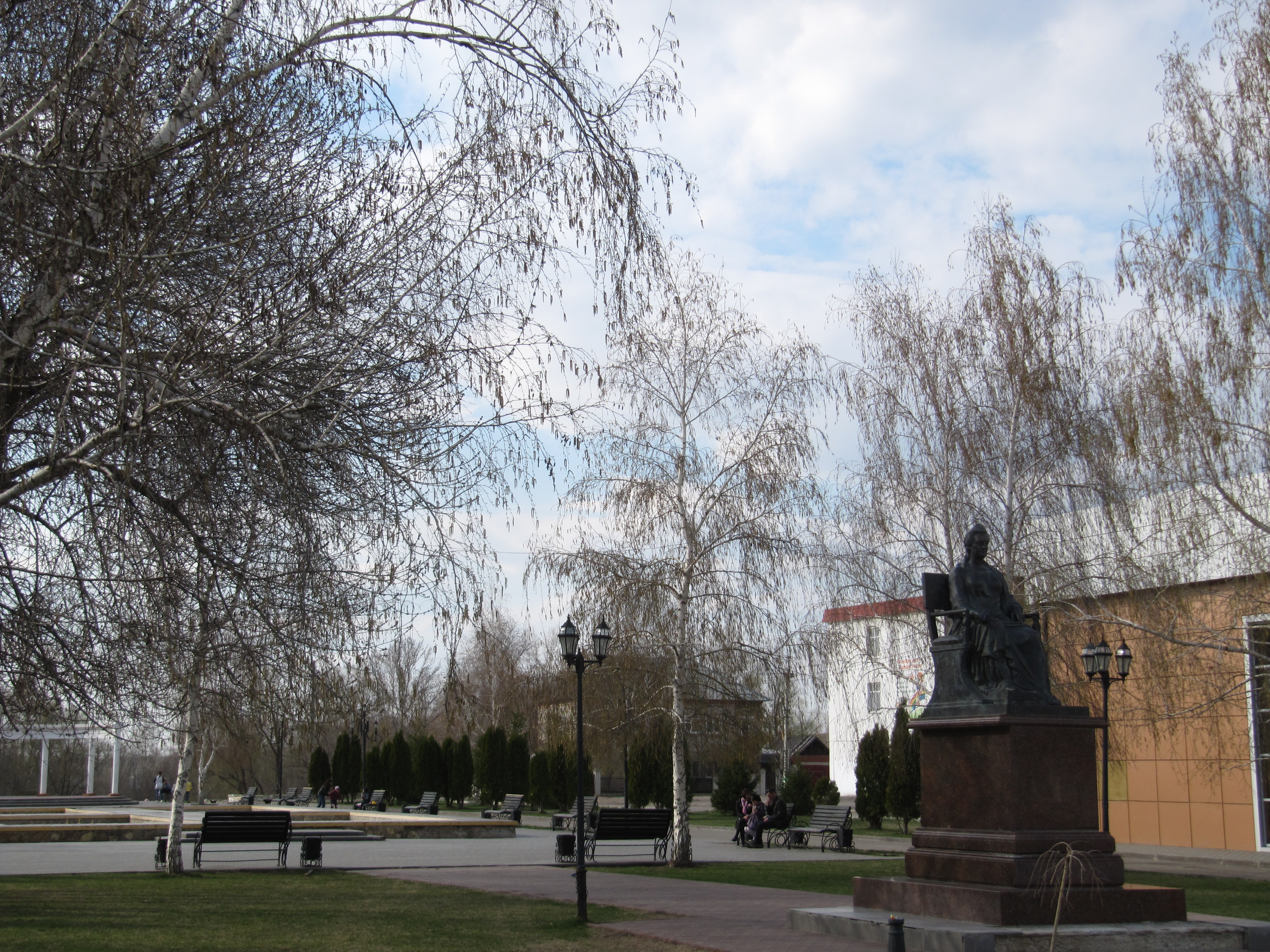 Памятник Екатерине Великой в городе Маркс, Саратовская область